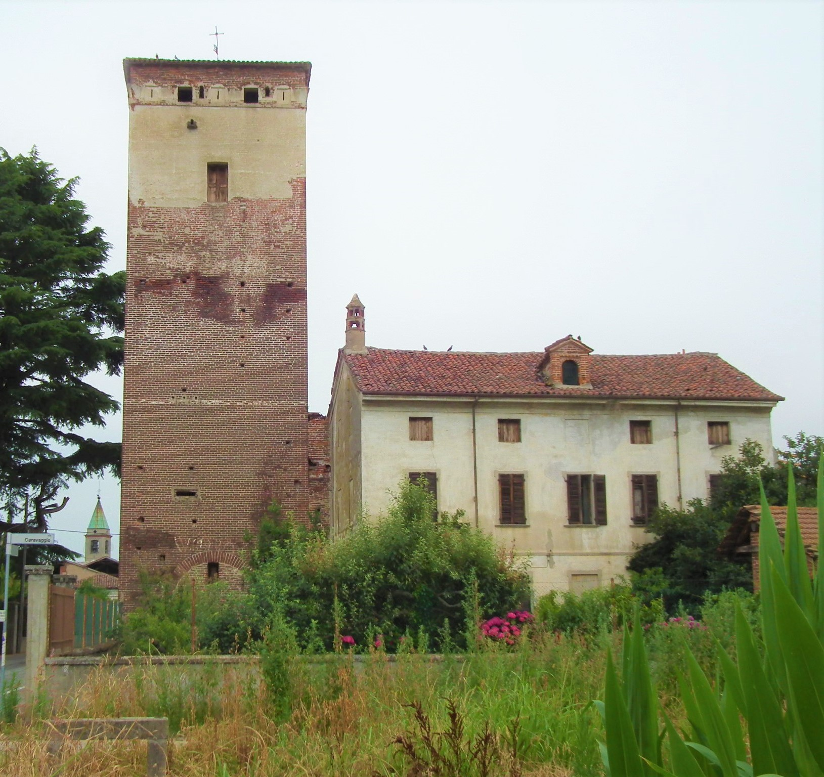 Vista frontale della Torre di Mandello Vitta